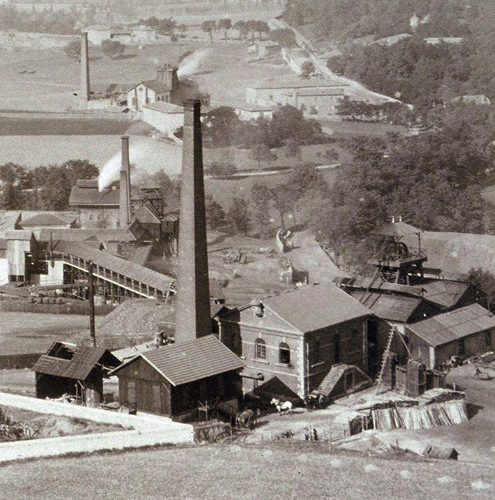 puist St.-Louis, st.-André et Mars